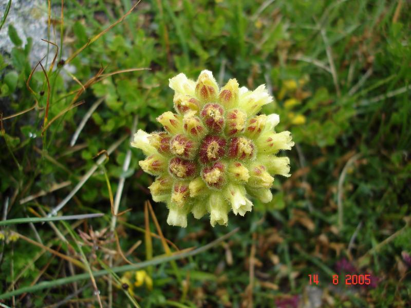 Алпийска роза